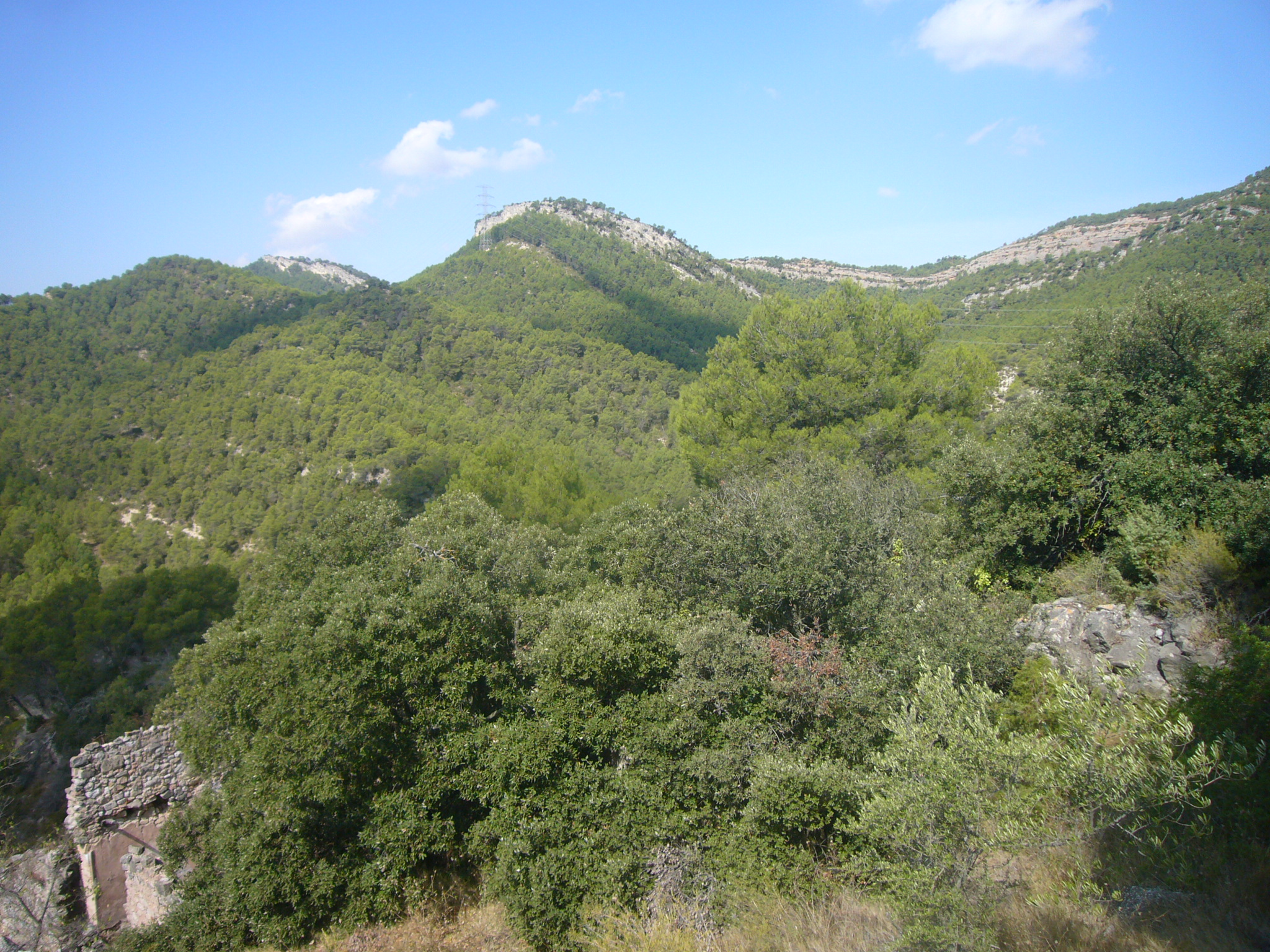 Vistes des del Castell de Miralles (Santa Maria de Miralles, Anoia), mirant a l'oest. Pot veure´s una bona part de la Serra de Miralles, amb el Turó de Coma-roques al centre, i L'Agulla Grossa a l'esquerra.